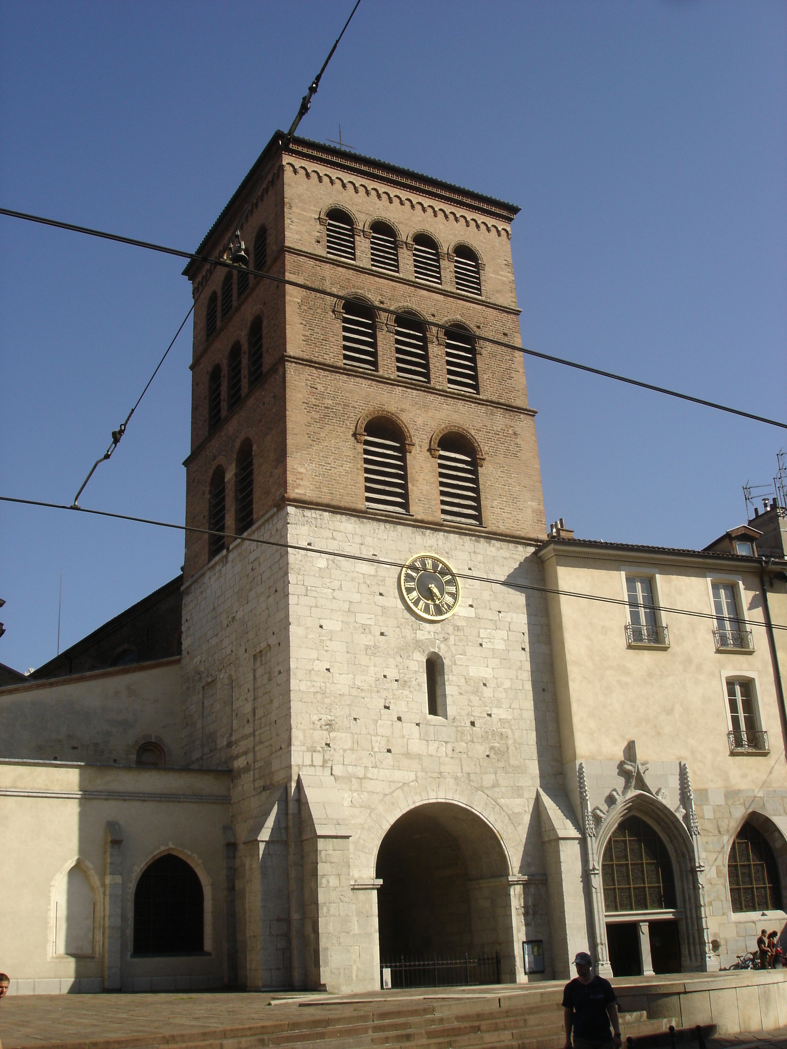 Cathédrale Notre-Dame à Grenoble.